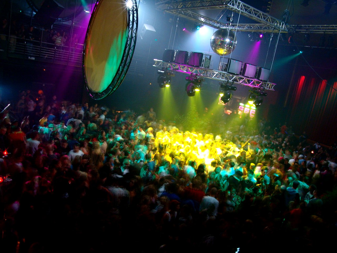 Cool Monday @ X-Tra